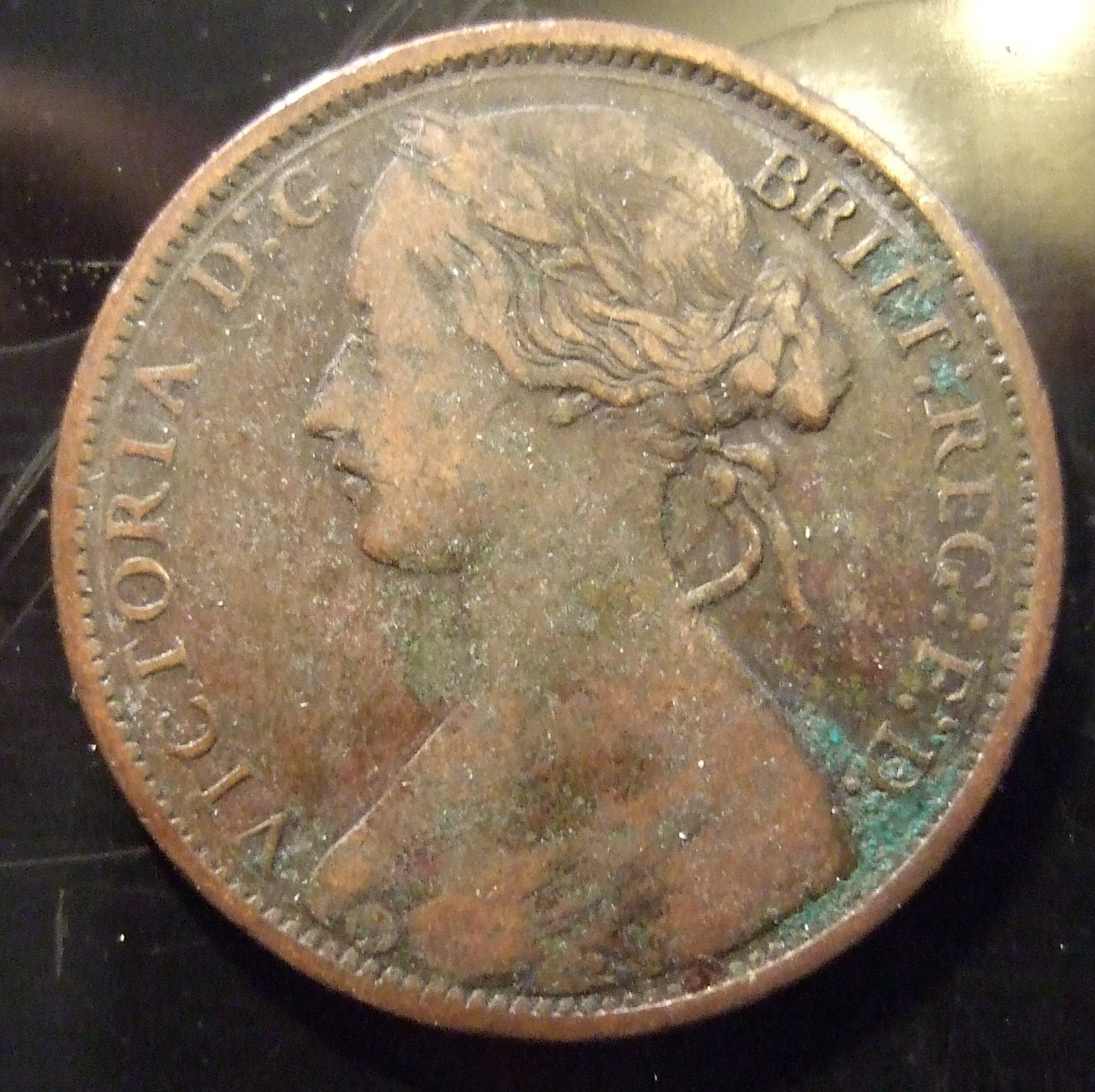 GREAT BRITAIN, VICTORIA 1866 ---ONE PENNY b